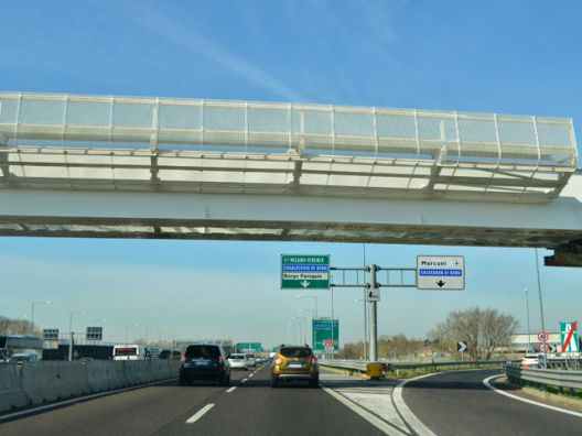 Ponte del People Mover sulla tangenziale